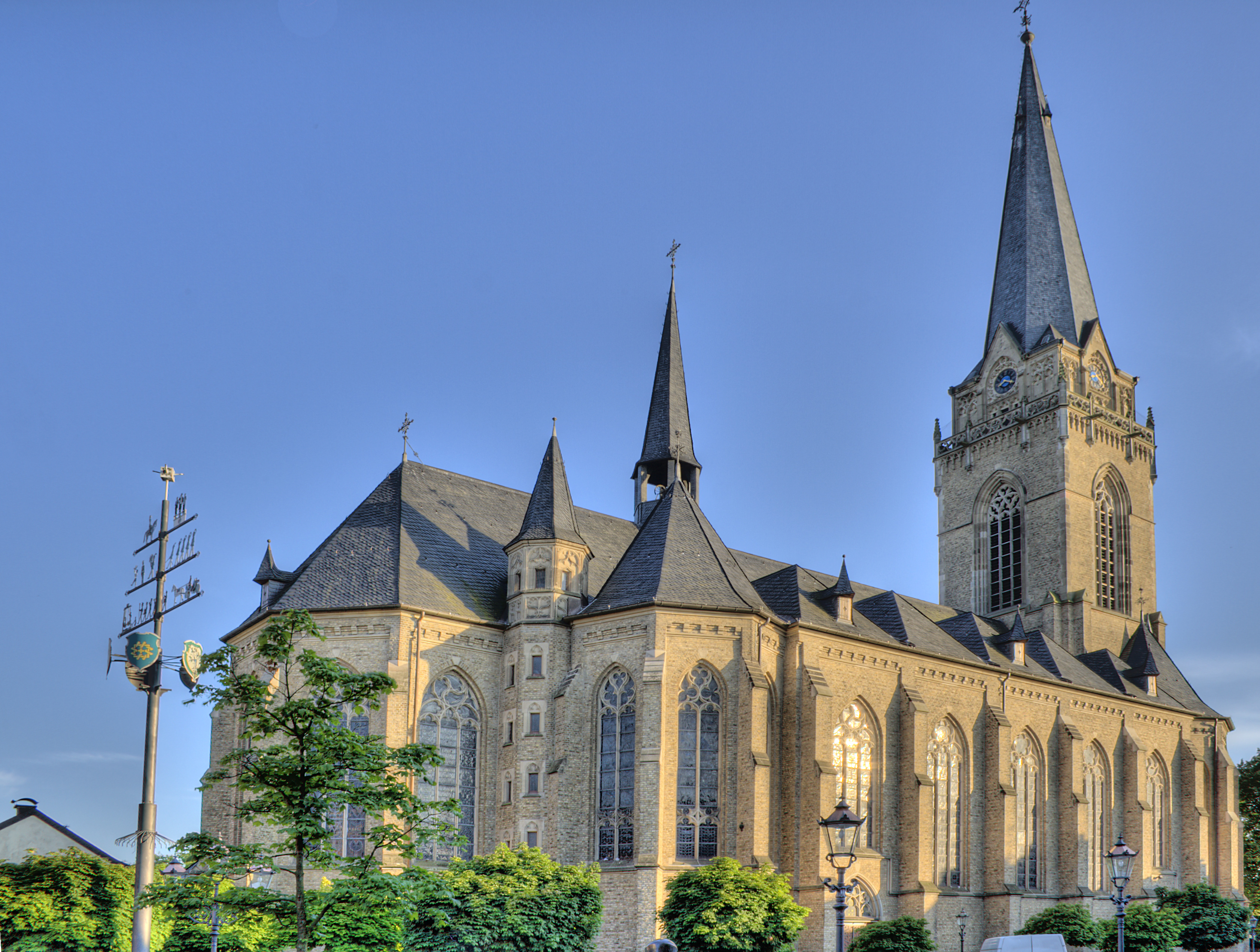 Kath. Kirche "St. Katharina" in Alt-Willich (Fotomontage mit blauem Himmel)